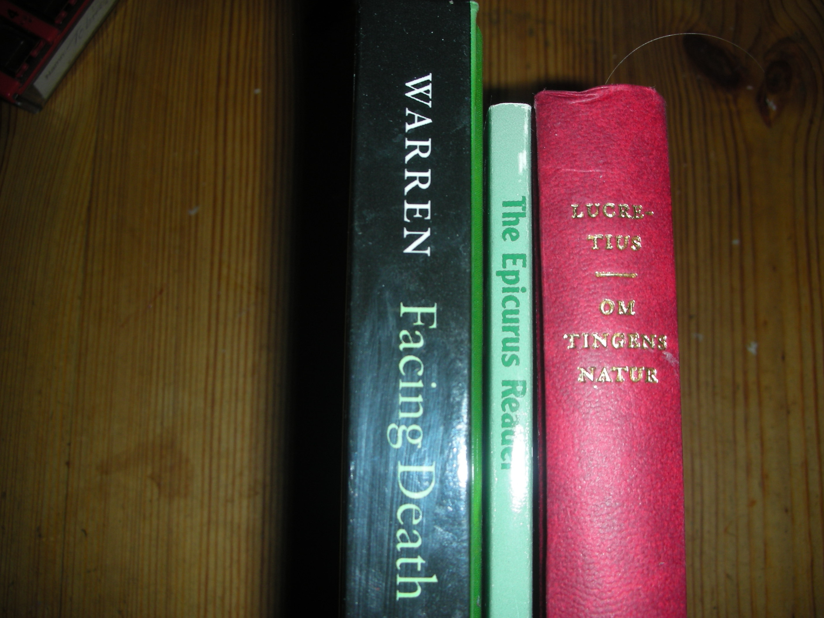 Epicurean literature